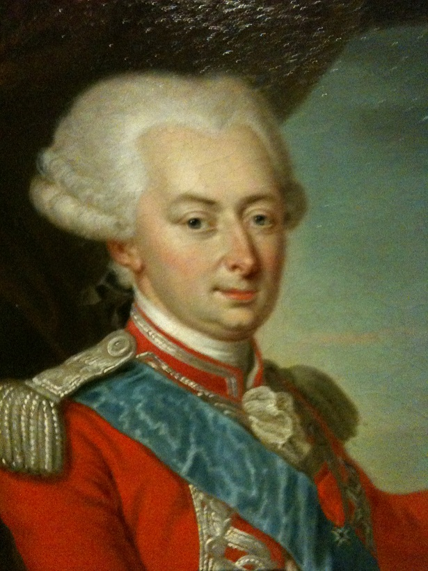 Portrait de Charles Eugène Gabriel de La Croix de Castries (1727-1801)